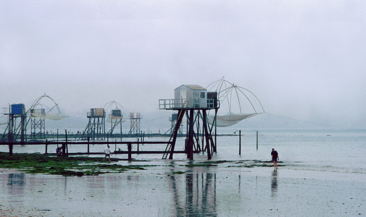 Pornic, Bretagne, France